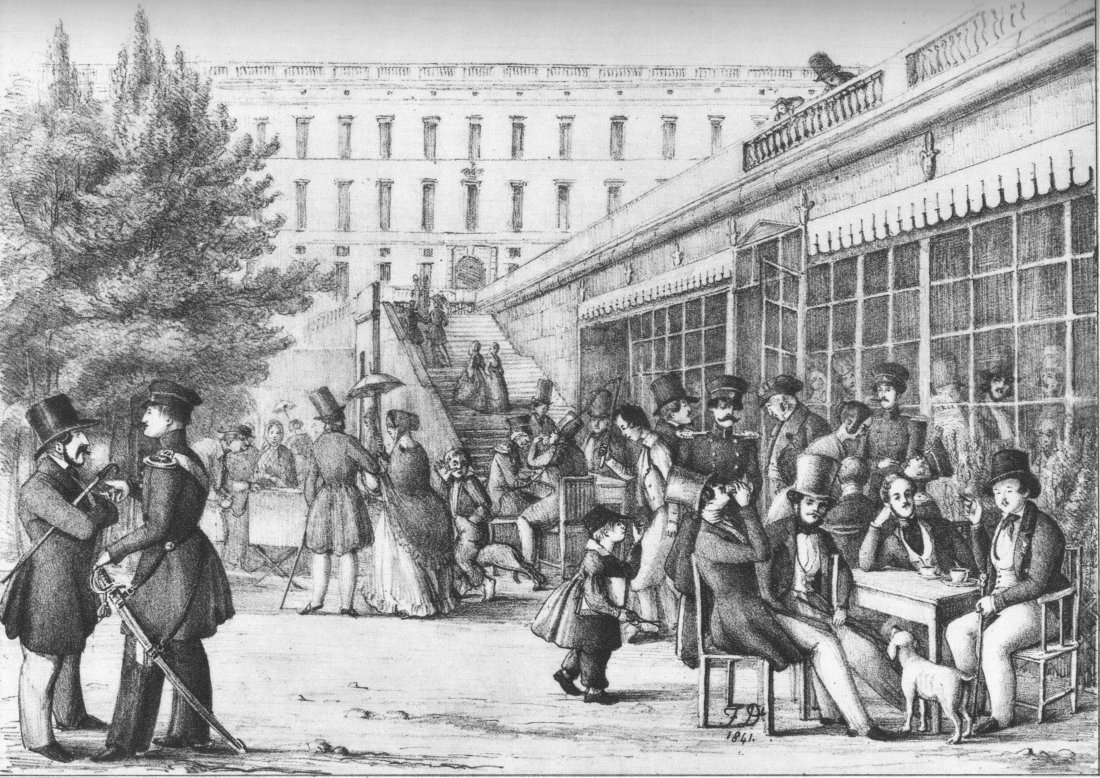 Strömparterren i centrala Stockholm 1841. Vid bordet i förgrunden utanför serveringen ser man Fritz von Dardel som tecknat bilden, med ett glas i handen. Löjtnanten med sabel är Johan August af Kullberg.